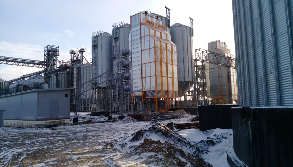 Зерносушилка Mega (Пензенская область)